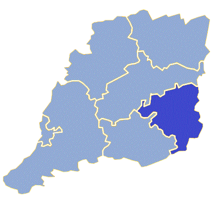 Powiat krośnieński (województwo lubuskie) - Gmina Dąbie